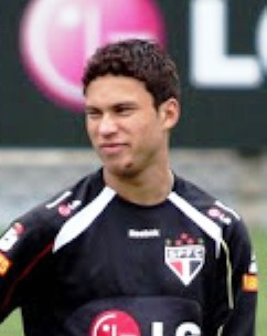 Jogador Marlos, treinamento do São Paulo Futebol Clube em 2009.